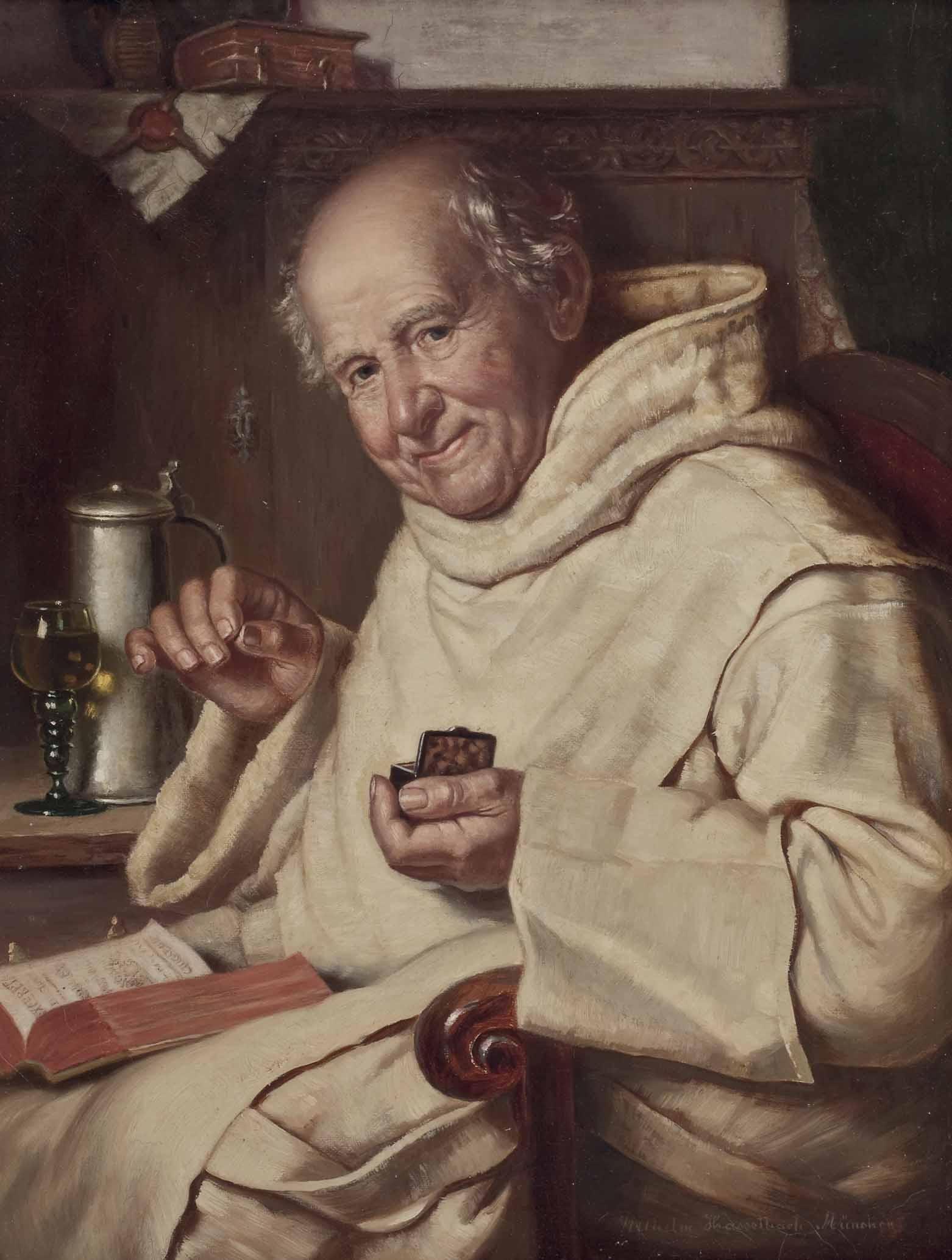 Pater mit Buch Schnupftabakdöschen und einem Glase Wein. Signiert: Wilhelm Hasselbach, München, Öl auf Leinwand, ca. 44 x 32 cm